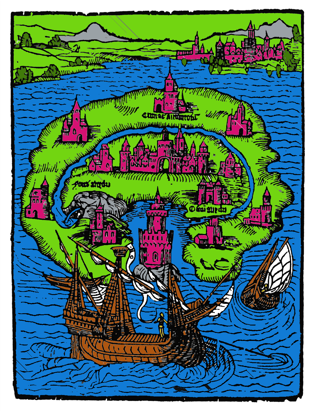 Titelholzschnitt aus Thomas Morus' Roman Utopia